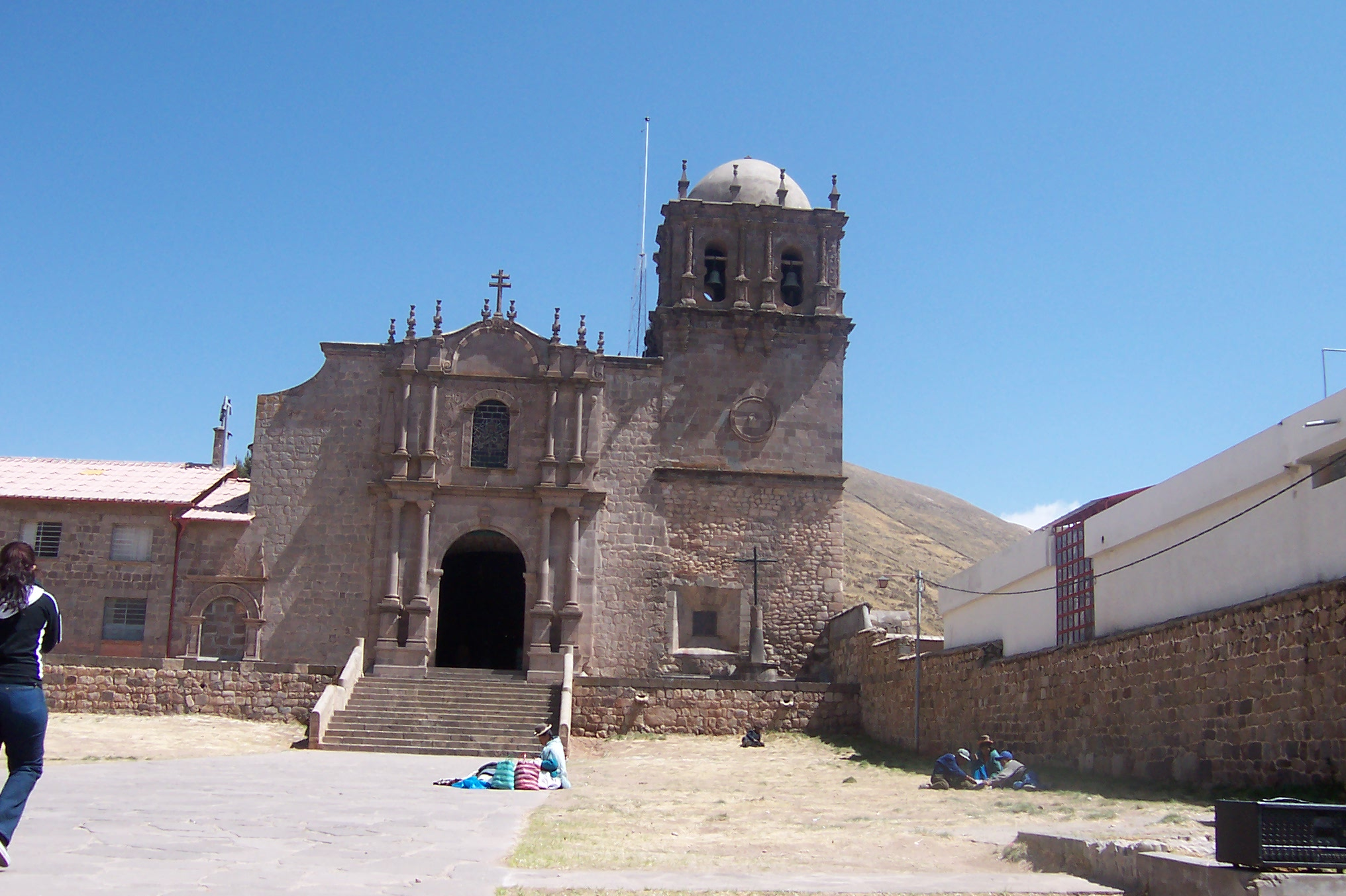 Juli, capital de la provincia de Chucuito. Vista exterior de la catedral. Autor: Alfredobi Fecha: Agosto 2006